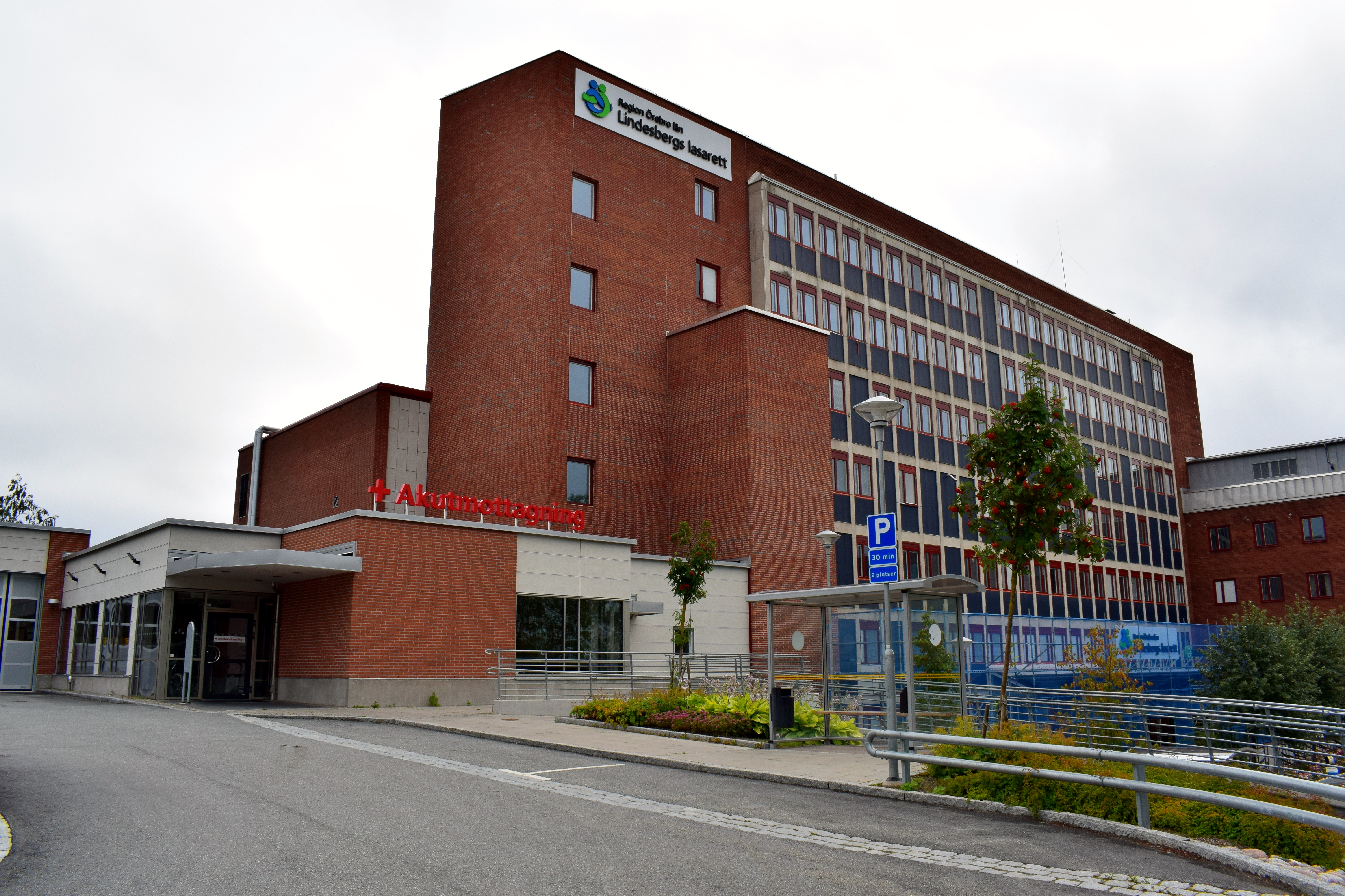 Lindesbergs lasarett i augusti 2019